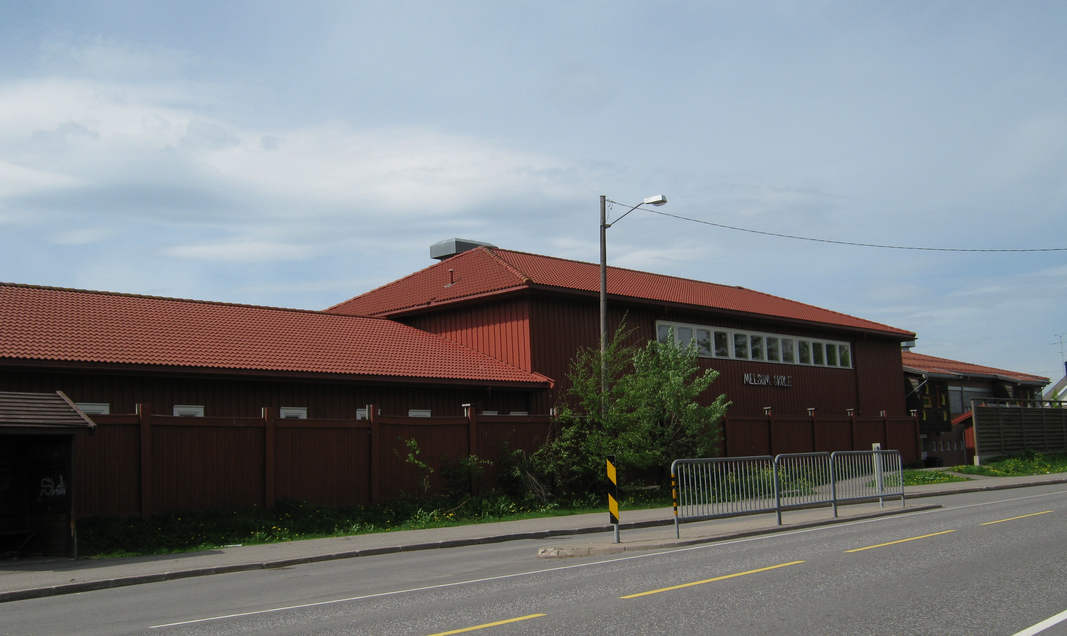 Melsom skole i Stokke, Vestfold